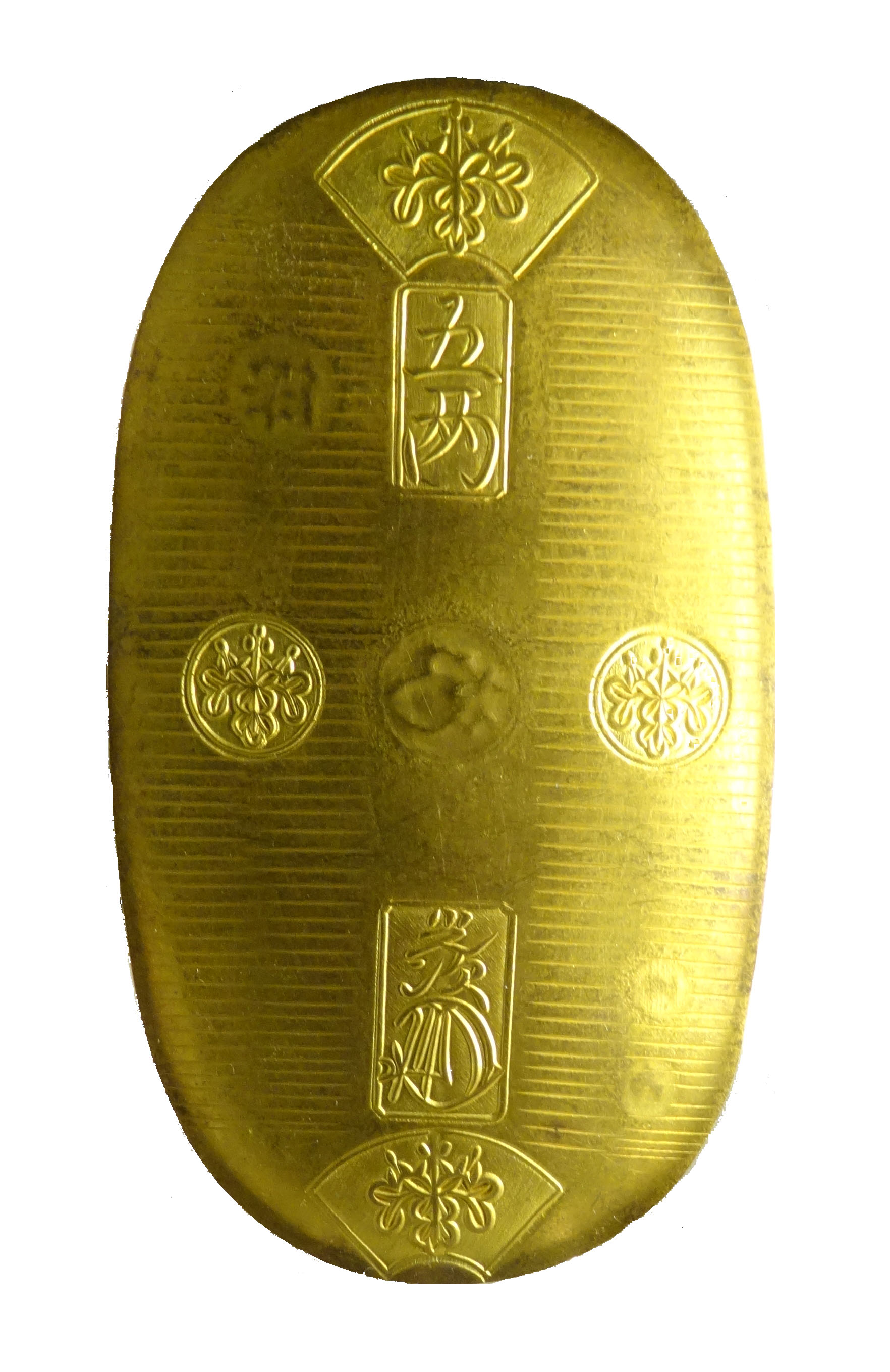 天保五両判（大阪造幣局 - 造幣博物館）